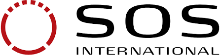 SOS Internationalin logo.